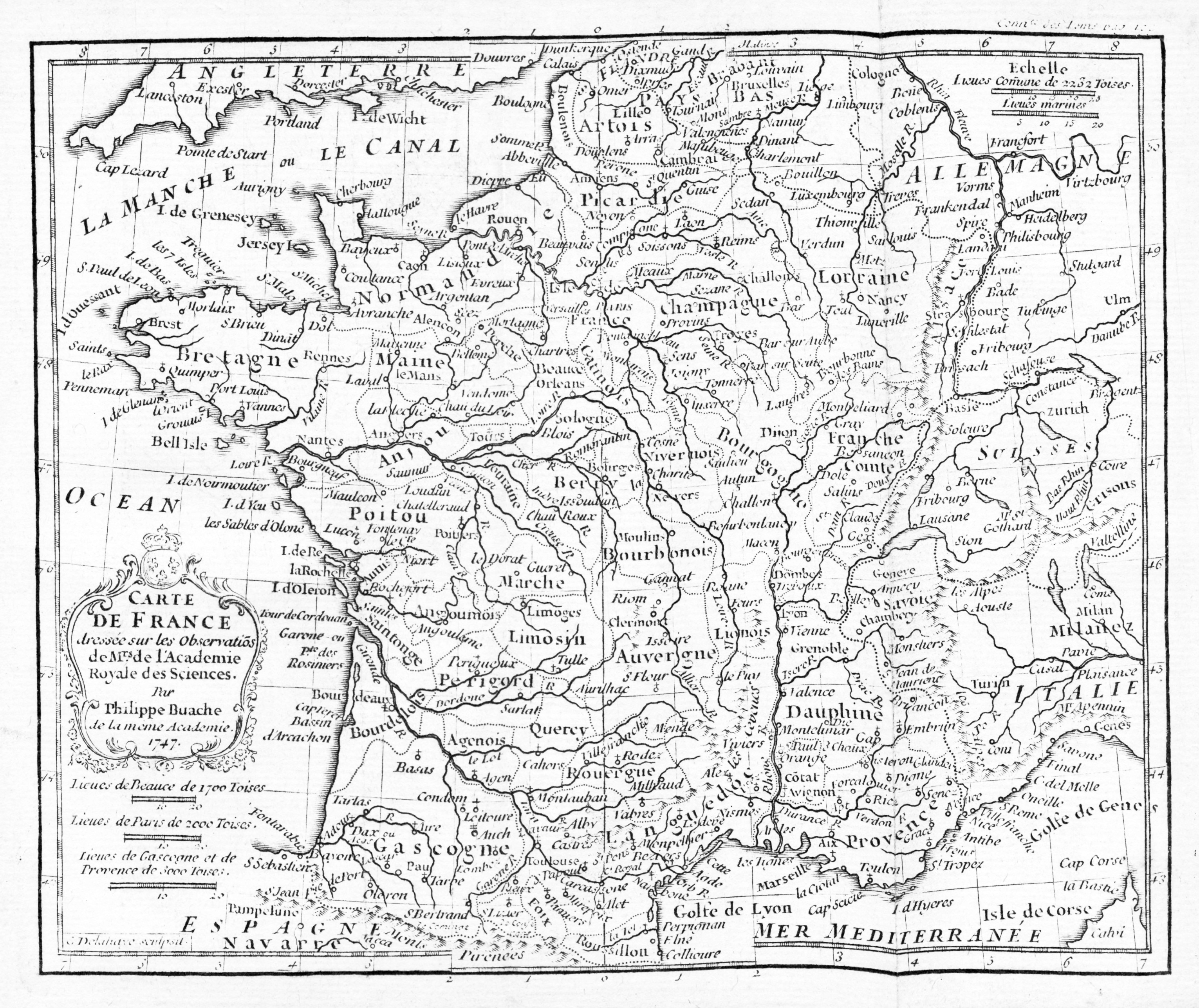 Carte de France d'après les travaux de triangulation publiés en 1747 avec ses coordonnées de longitude et de latitude.